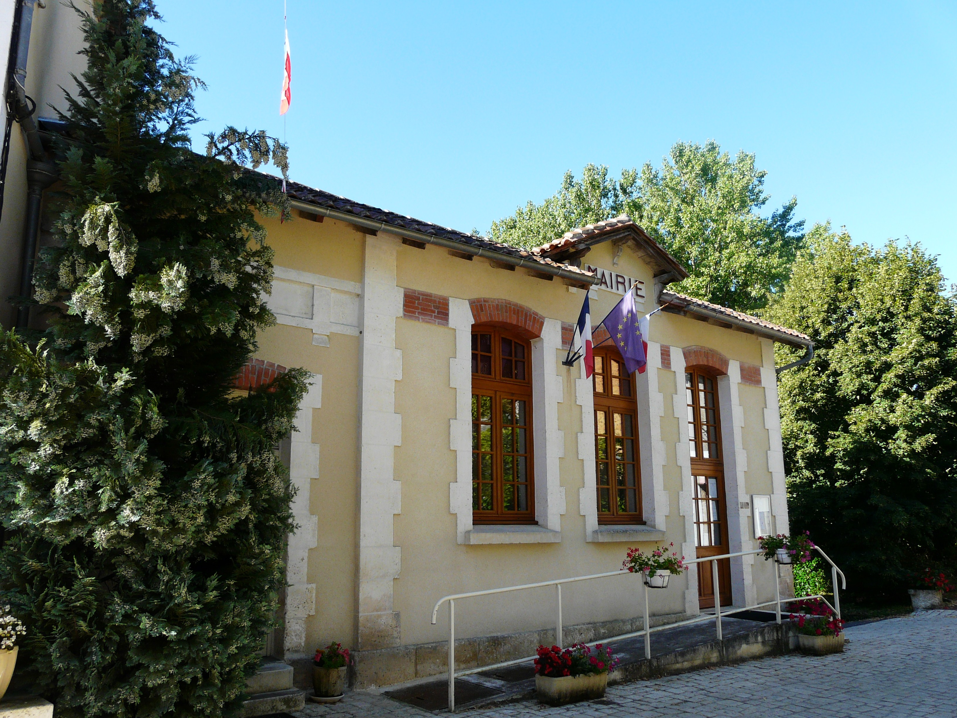 La mairie de Teyjat, Dordogne, France.